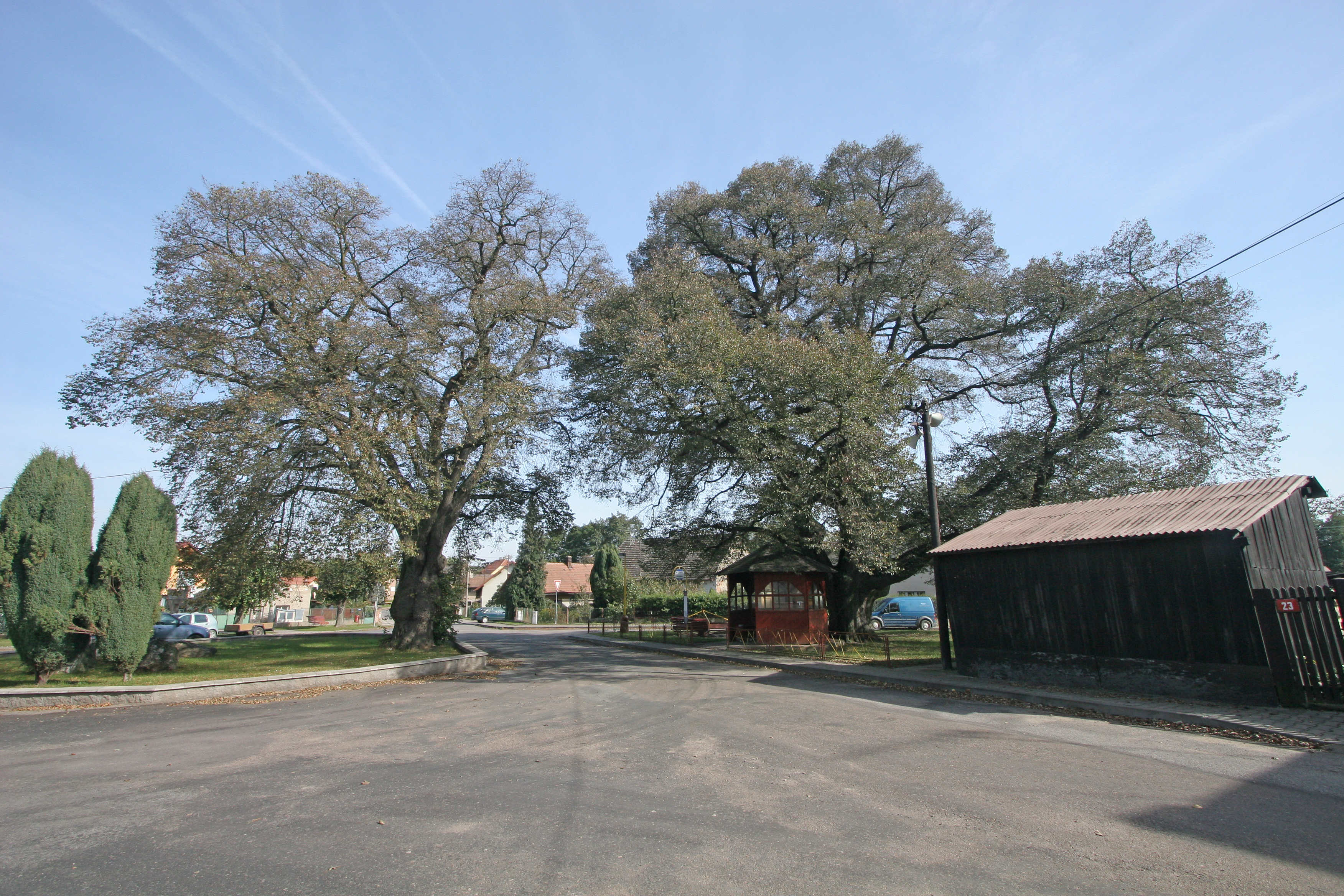 Sovolusky lípy